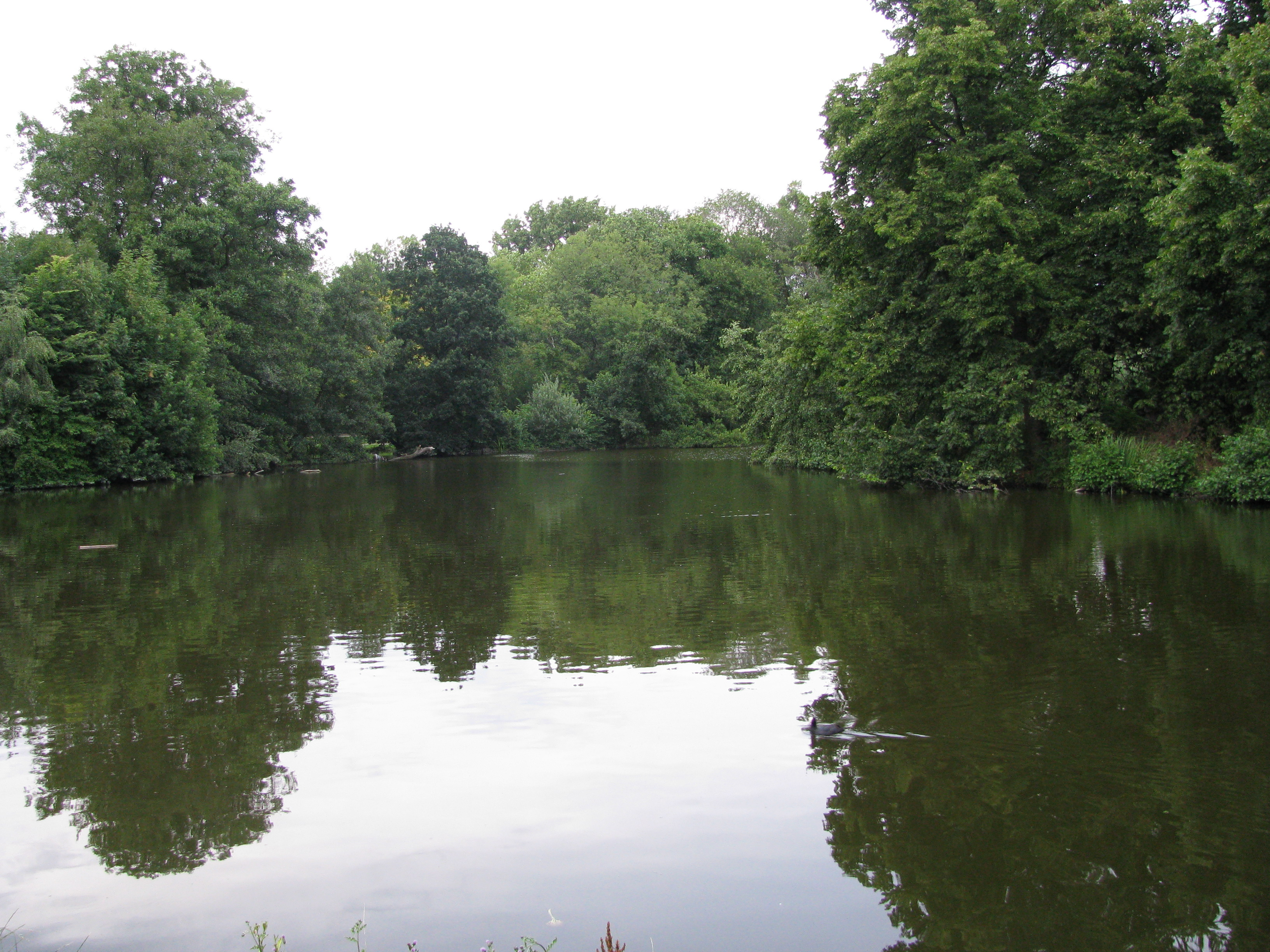 Lampi Vondelparkissa